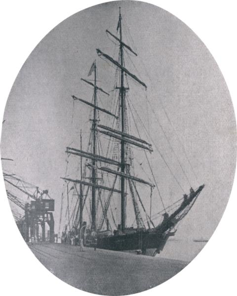 Rejs przez równik - STS Lwów w Rio de Janeiro 1923 r.